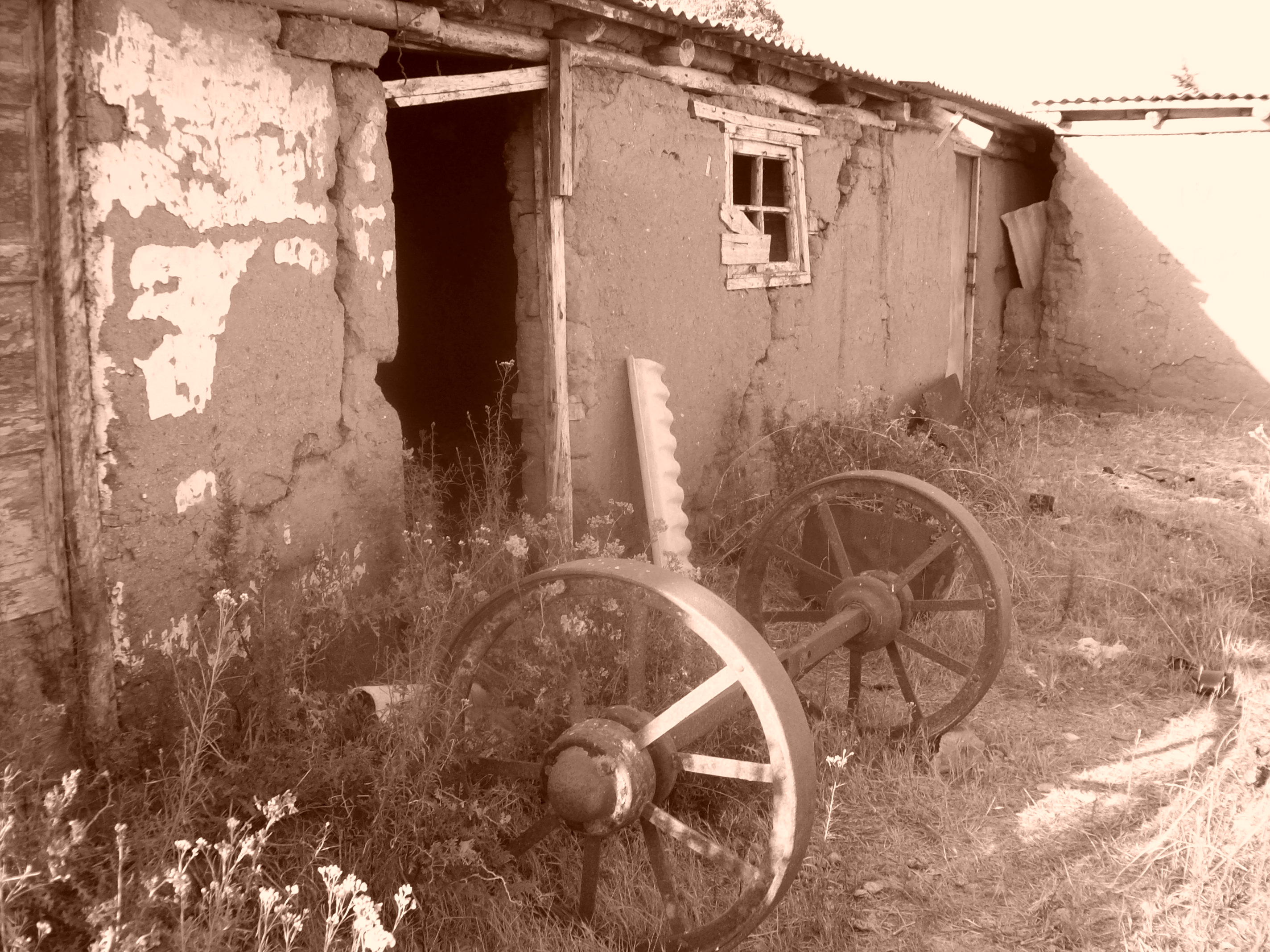 patrimonio antiguo de canela